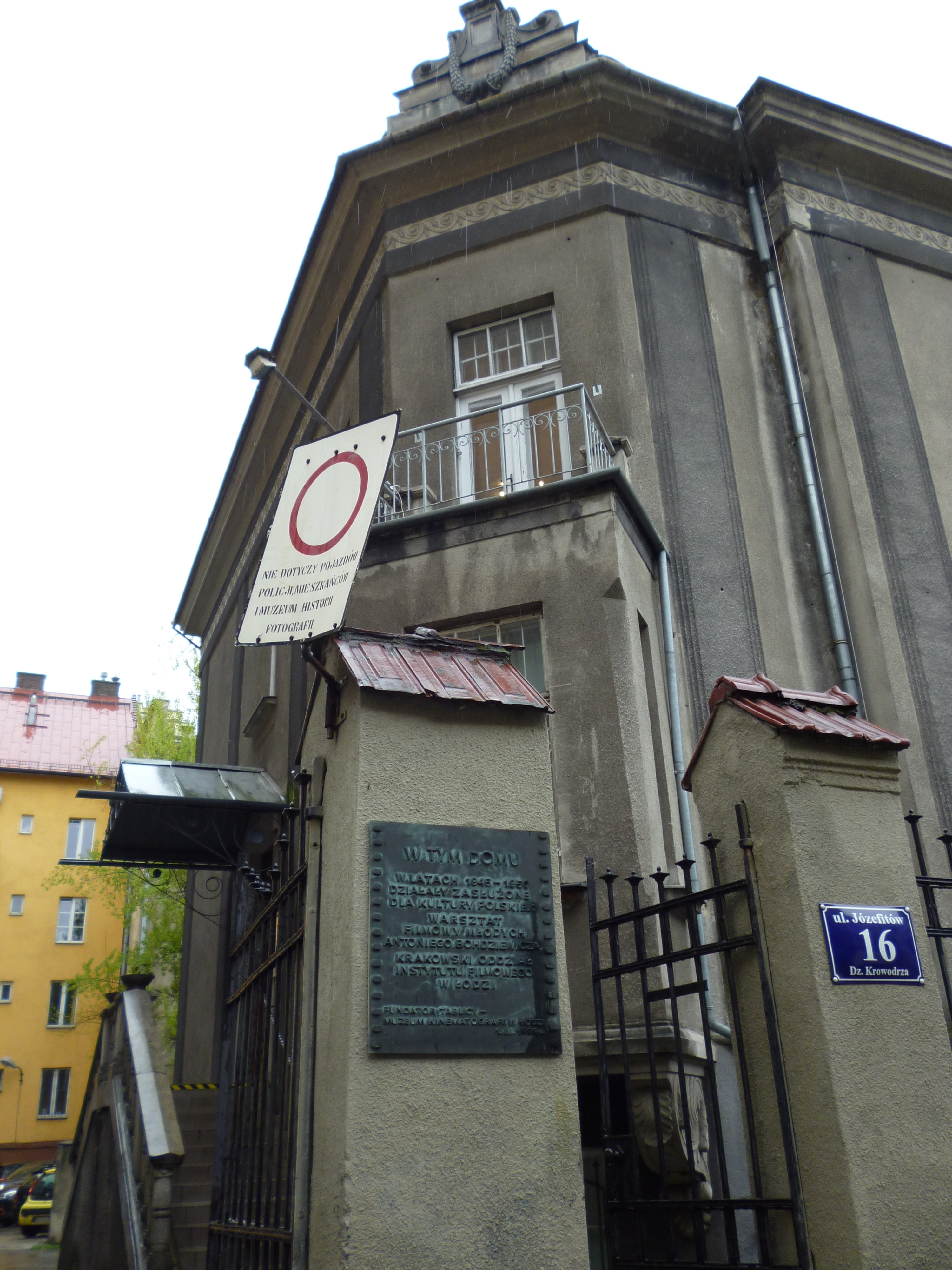 Dom w którym w latach 1945-1950 znajdował się Warsztat Filmowy Młodych Antoniego Bohdziewicza Krakowski Oddział Instytutu Filmowego w Łodzi, obecnie siedziba Muzeum Historii Fotografii w Krakowie